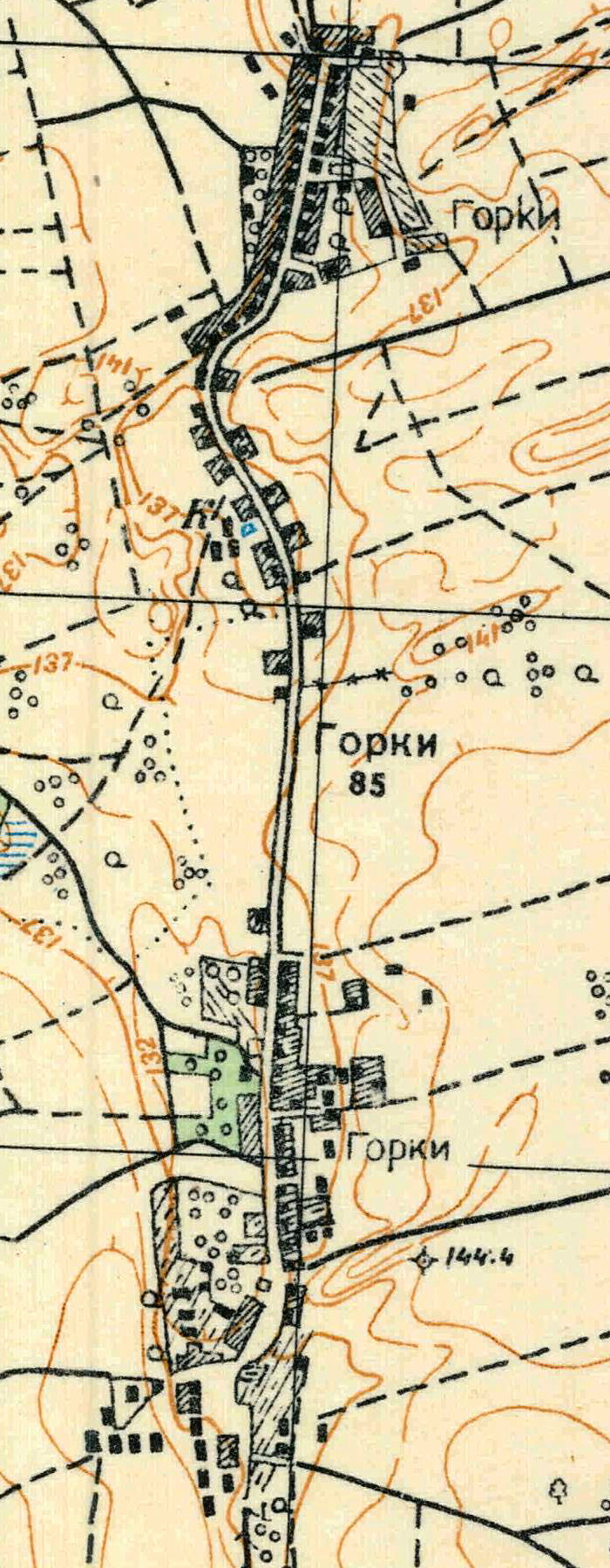 Топографическая карта Ленинградской области, квадрат О-35-24-А-г (Горки), деревня Горки